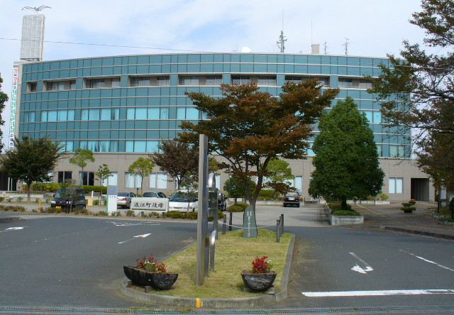 浪江町役場